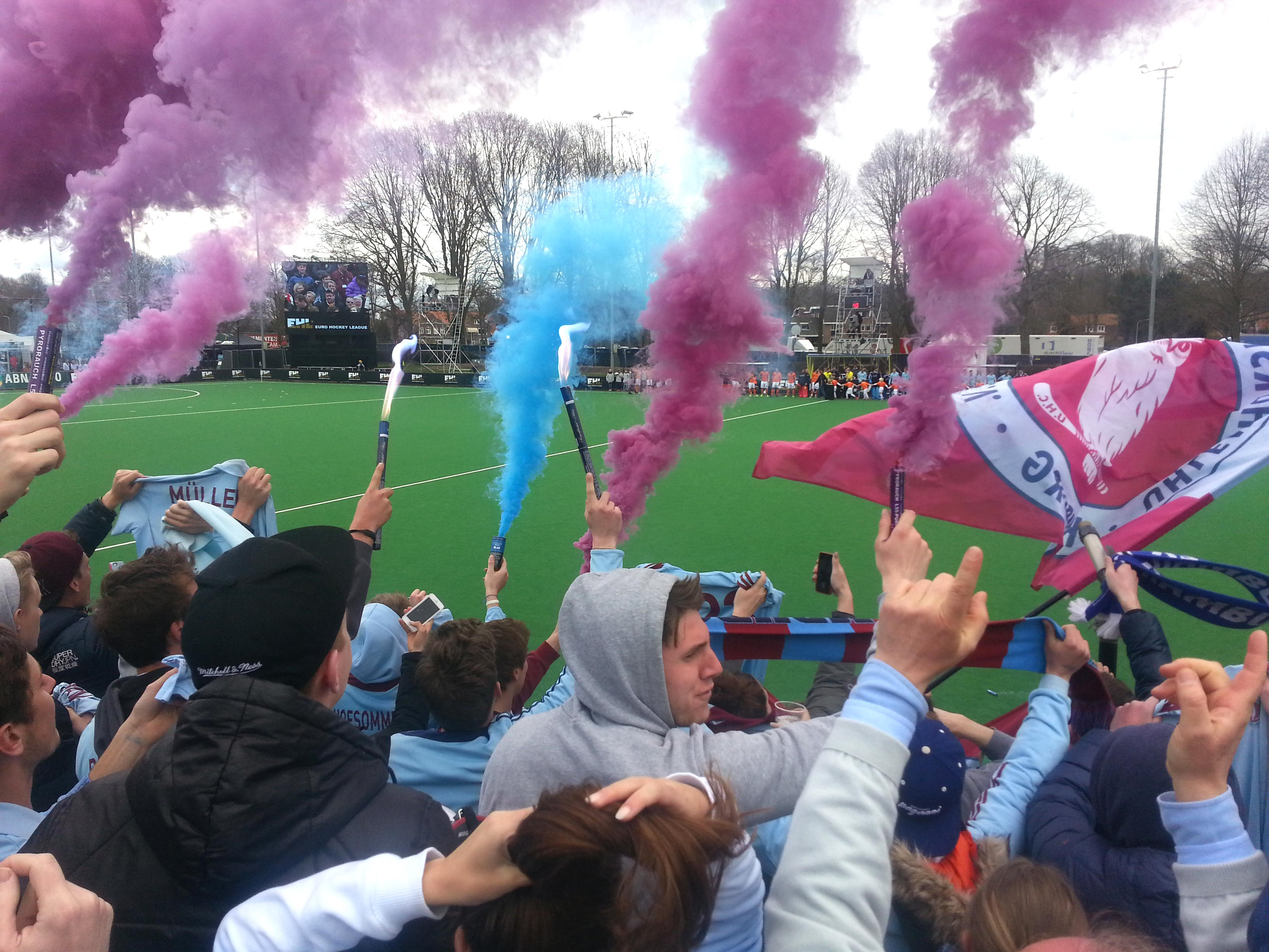 Fans des Uhlenhorster HC beim Finale der Euro Hockey League 2014/15